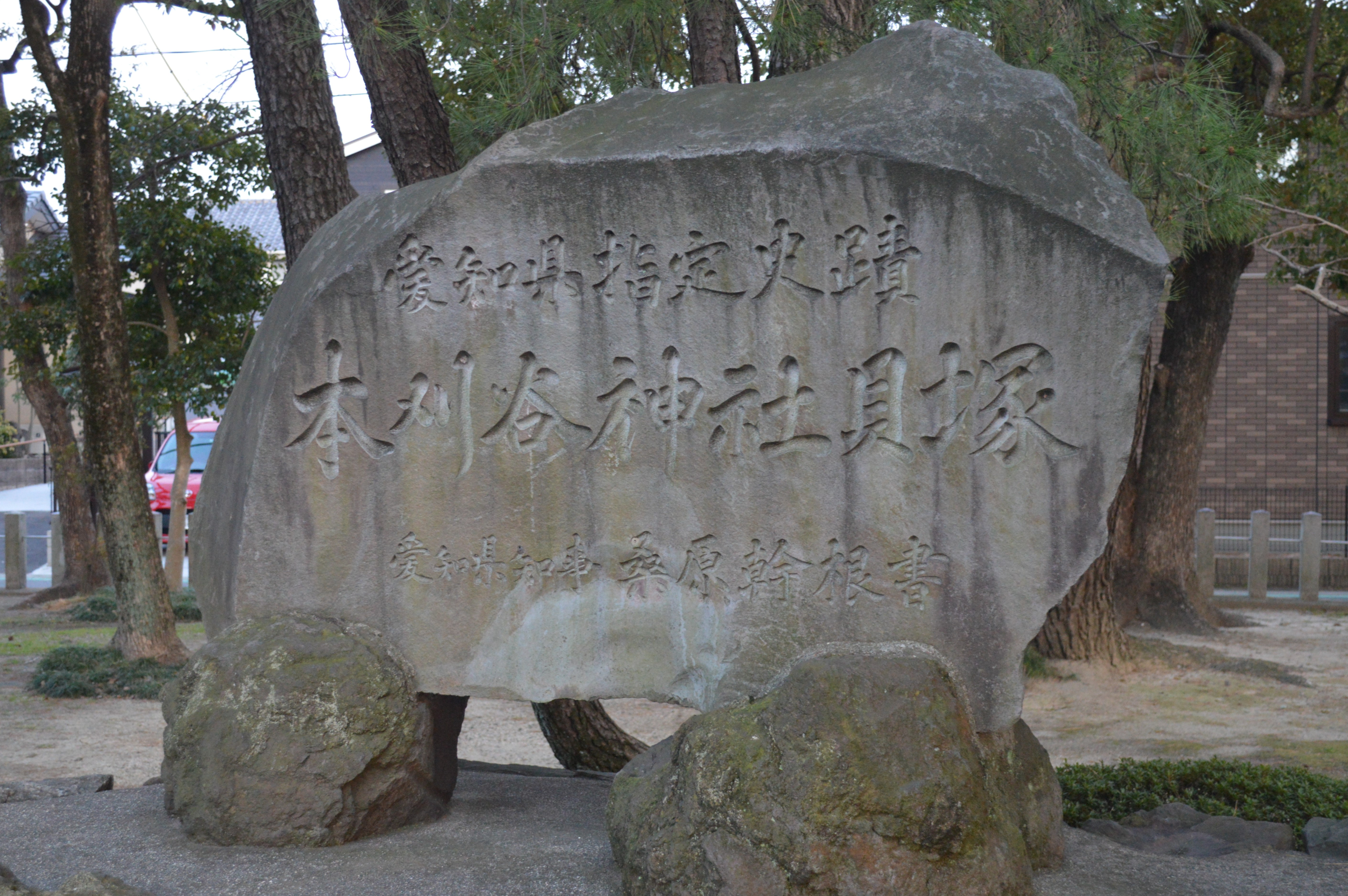 愛知県刈谷市天王町4丁目9番地にある本刈谷神社。本刈谷神社貝塚（本刈谷貝塚）。愛知県指定有形文化財（考古資料）。